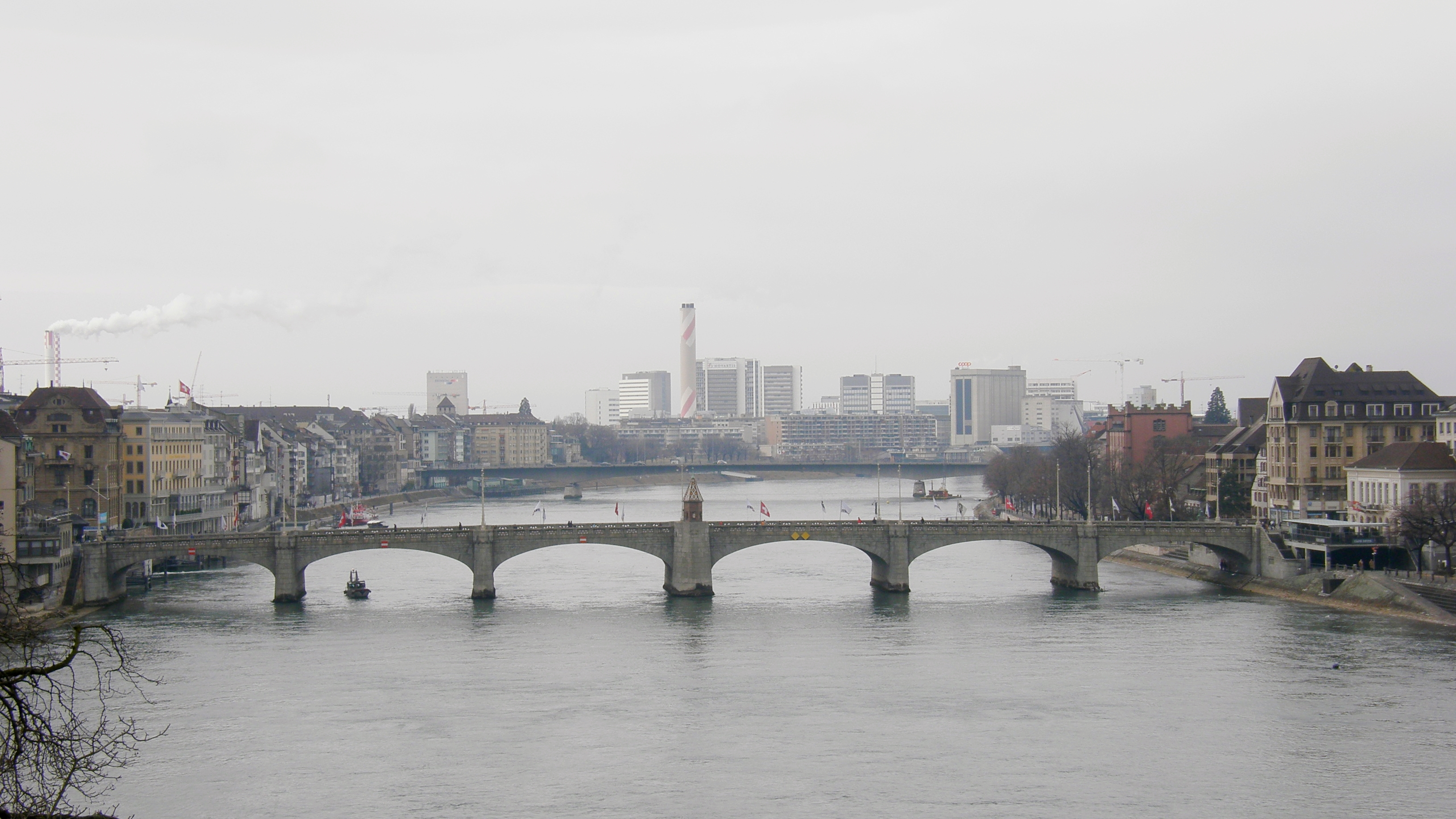 Bâle / Basel Suisse / Switzerland Mittlere Rheinbrücke